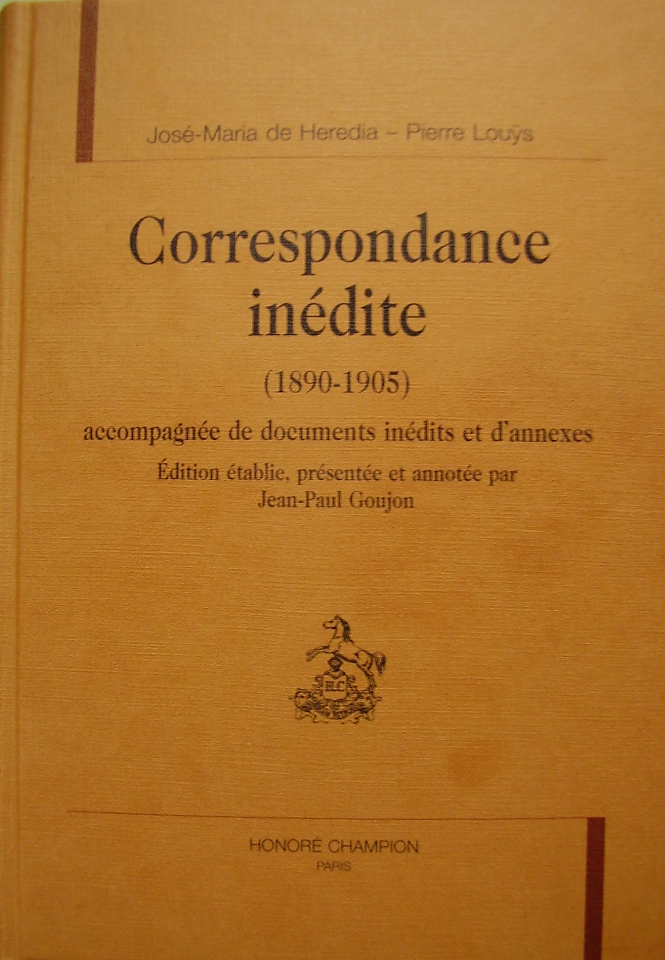 Couverture d'un ouvrage paru chez Honoré Champion